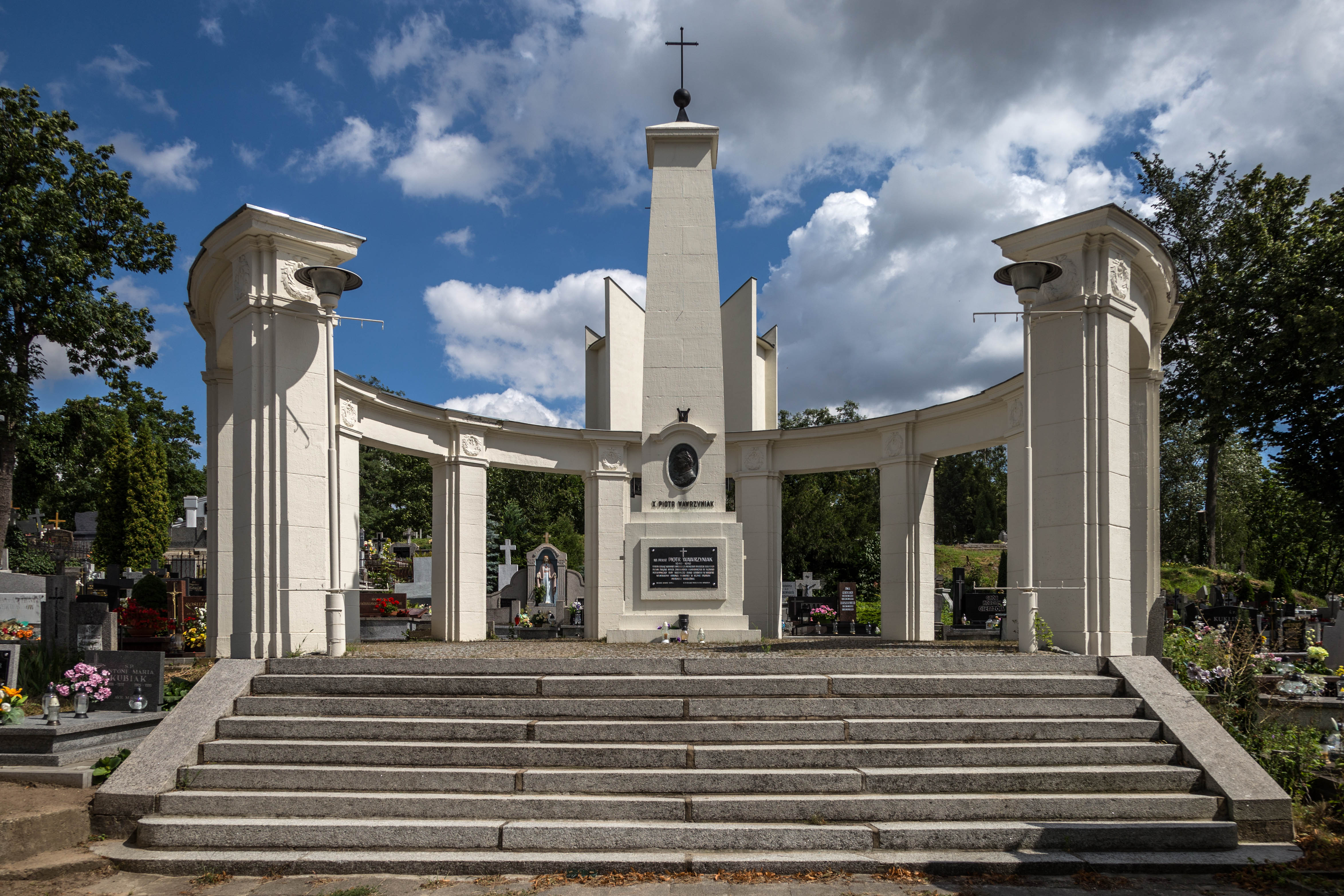 Mauzoleum ks. Piotr Wawrzyniaka na cmentarzu parafialnym w Mogilnie, księdza, wielkopolskiego działacza społecznego, oświatowego i gospodarczego, patrona Związku Spółek Zarobkowych i Gospodarczych.